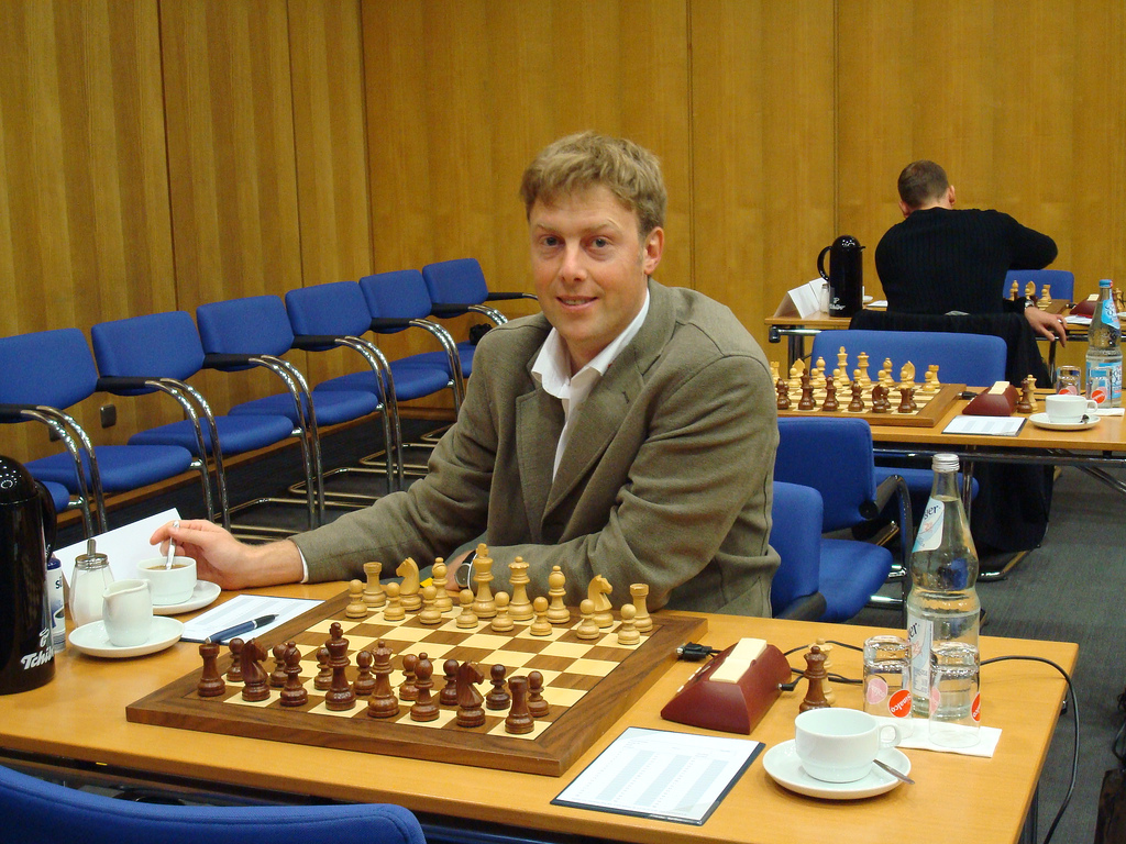 GM Pavel Tregubov Russia, Schachbundesliga 2008